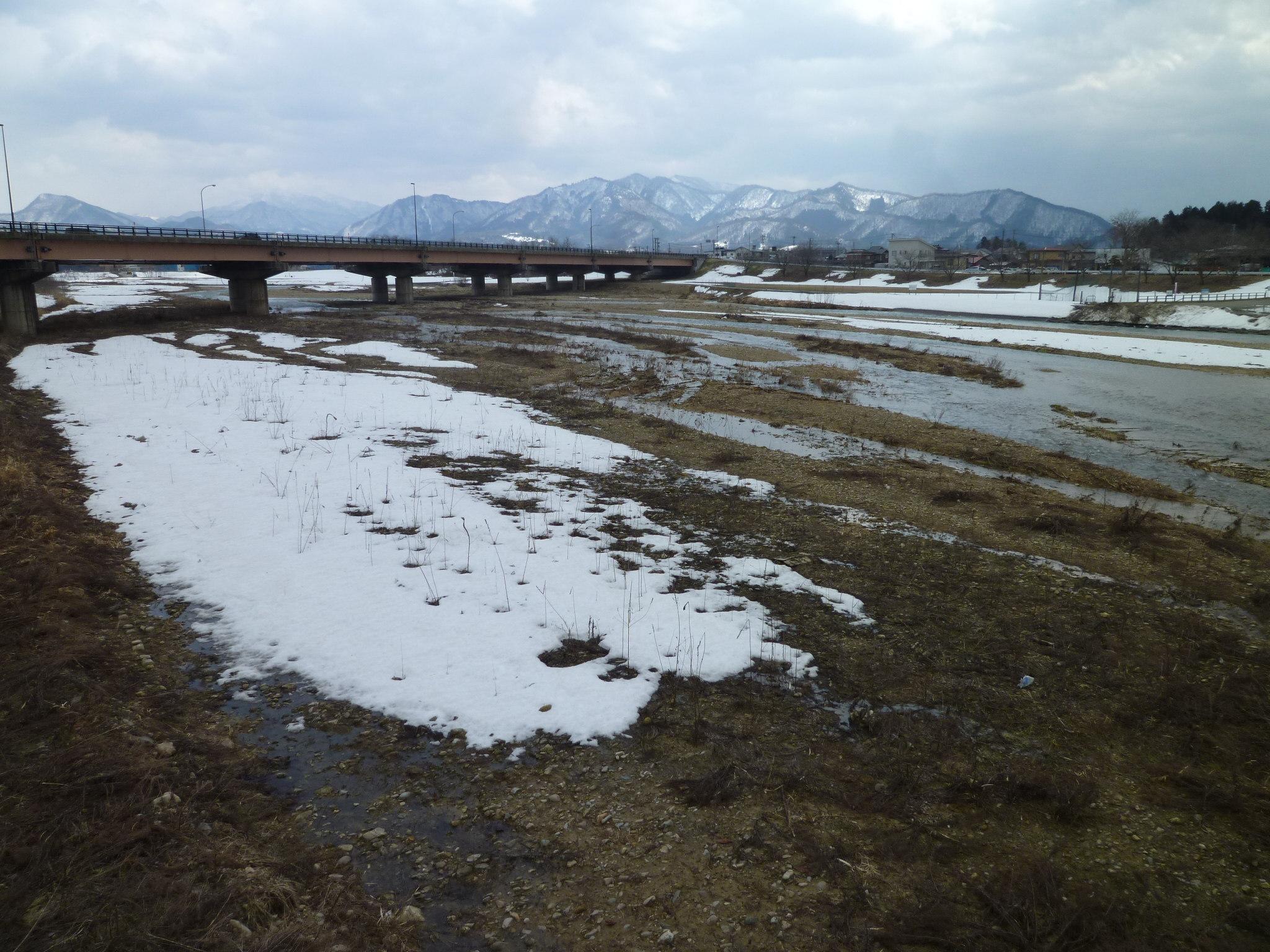 乱川。最上川水系。山形県天童市万代、県道22号万代橋から上流方向を撮影。